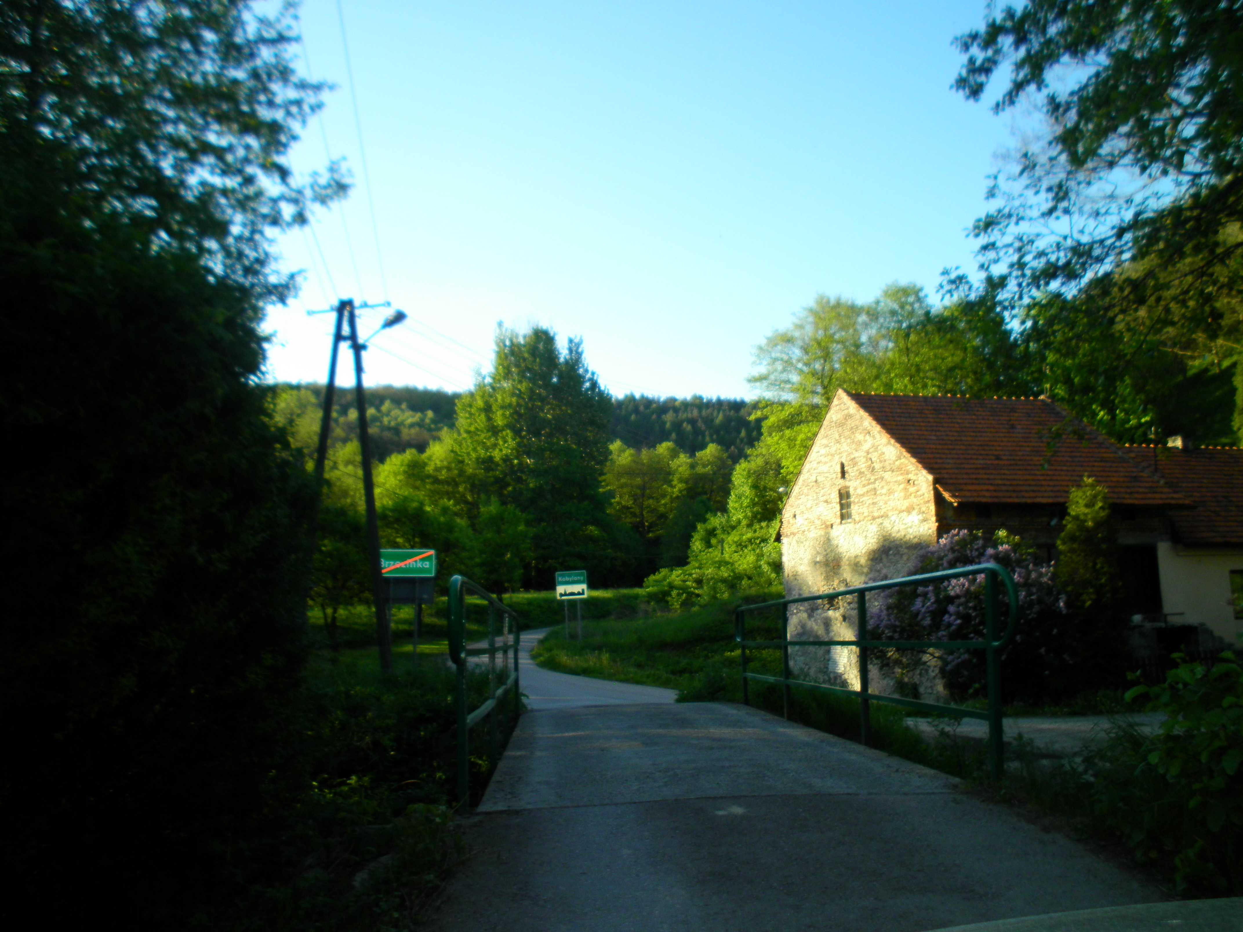 Granica Łączek Brzezińskich i Łączek Kobylańskich